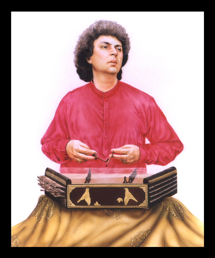 pandit shivkumar sharma